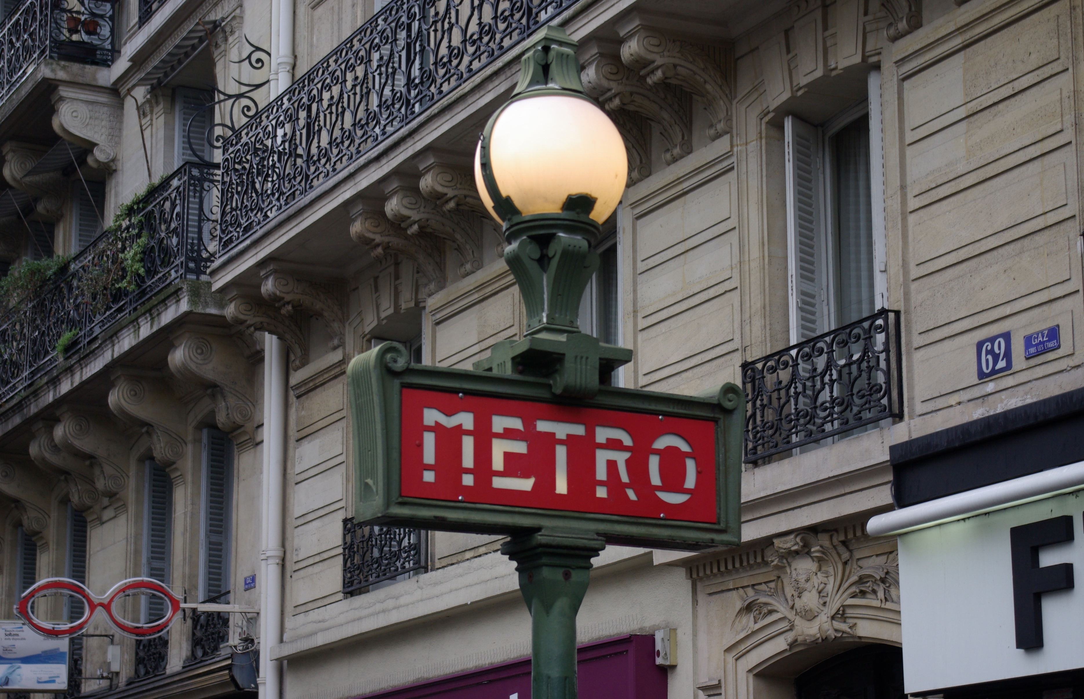 Station Maubert - Mutualité der Pariser Metro